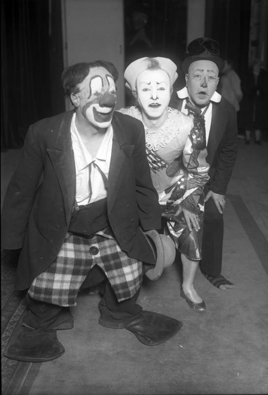 Die drei Fratellinis, die berühmtesten Clowns der Welt ! Die drei Fratellinis in einer ihrer lustigsten Szenen und Verkleidung.